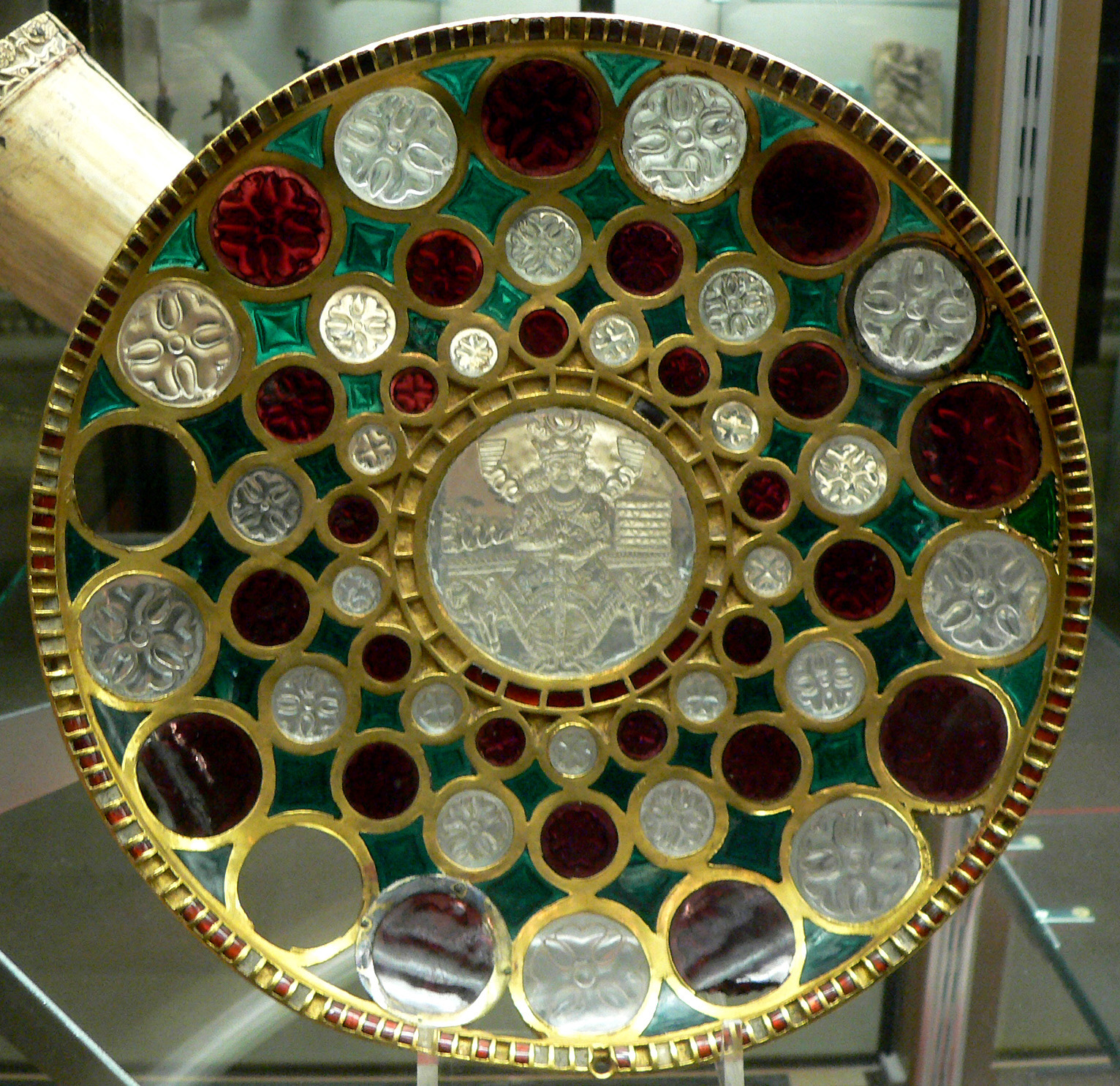 Coupe de Chosroès Coupe en or de Chosroès, dite Tasse de Salomon, Camée central: le roi trônant. Pièce d'orfèvrerie sassanide. Diam.: 28,2 cm; H.: 5 cm; diam. du camée central, 7,4 cm. Or, grenat, cristal de roche, verre. Cette coupe a appartenu au Trésor de Saint-Denis. Acquis en 1791.